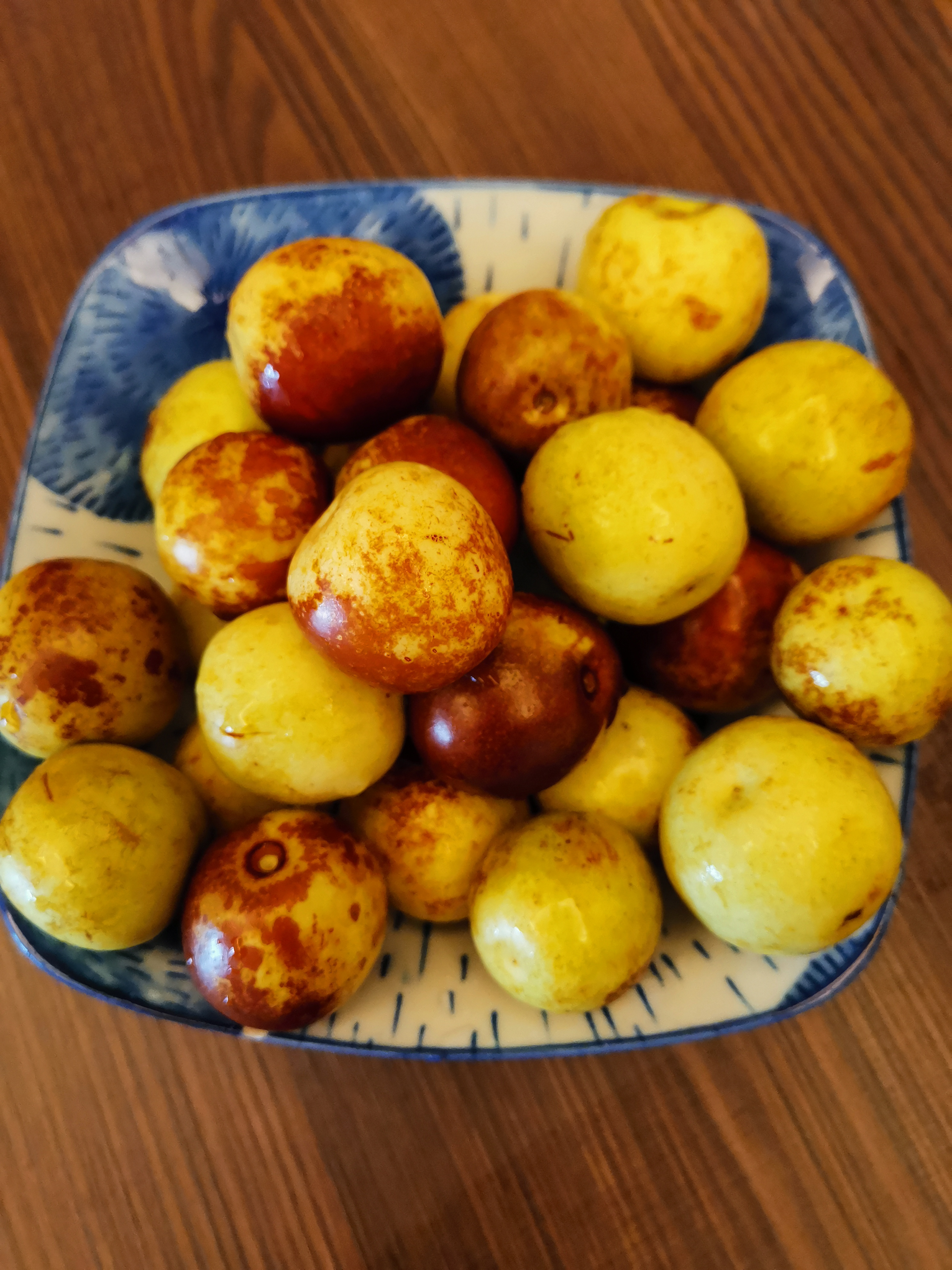 山东沾化冬枣 2019.11